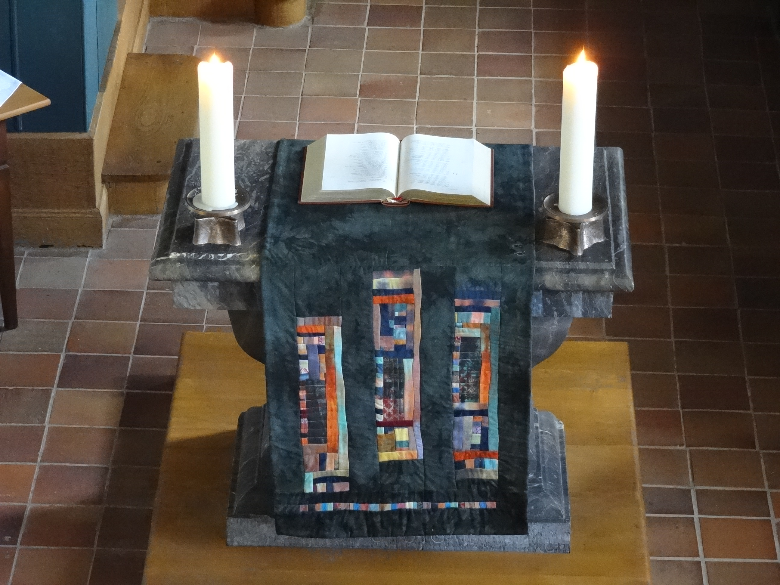 Evangelische Kirche Nonnenroth (Hungen)